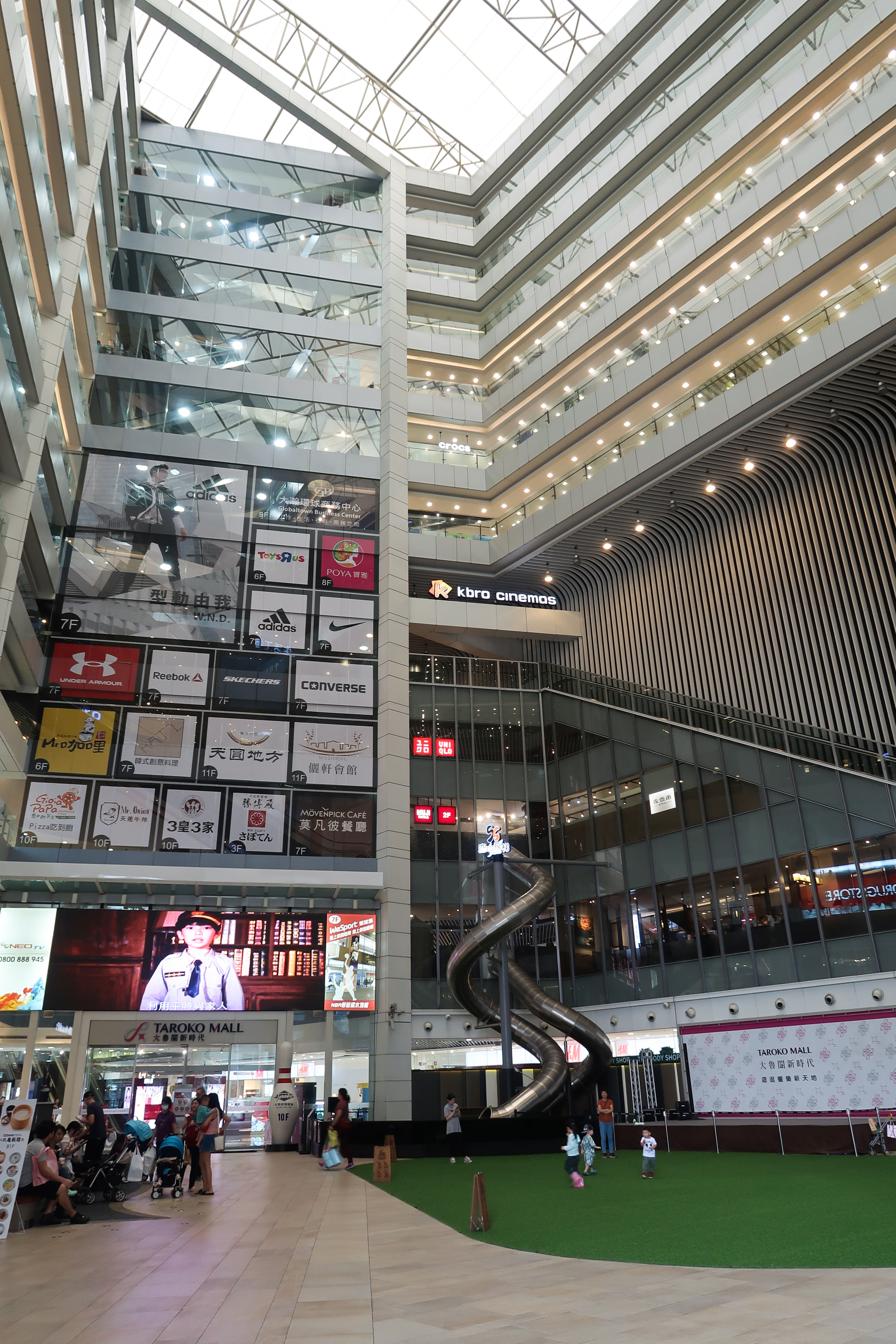 TAROKO MALL Atrium